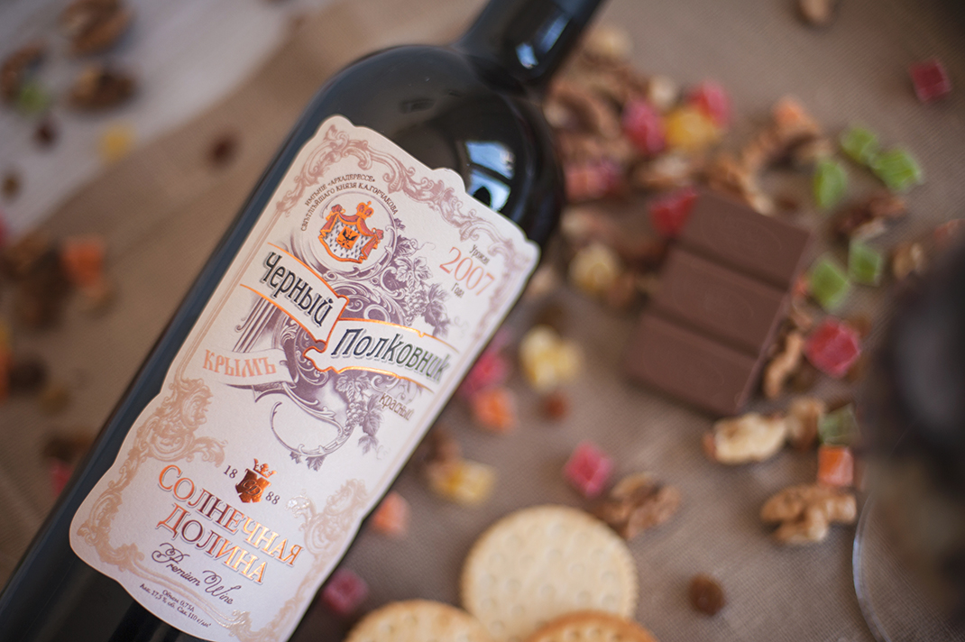 Выставка